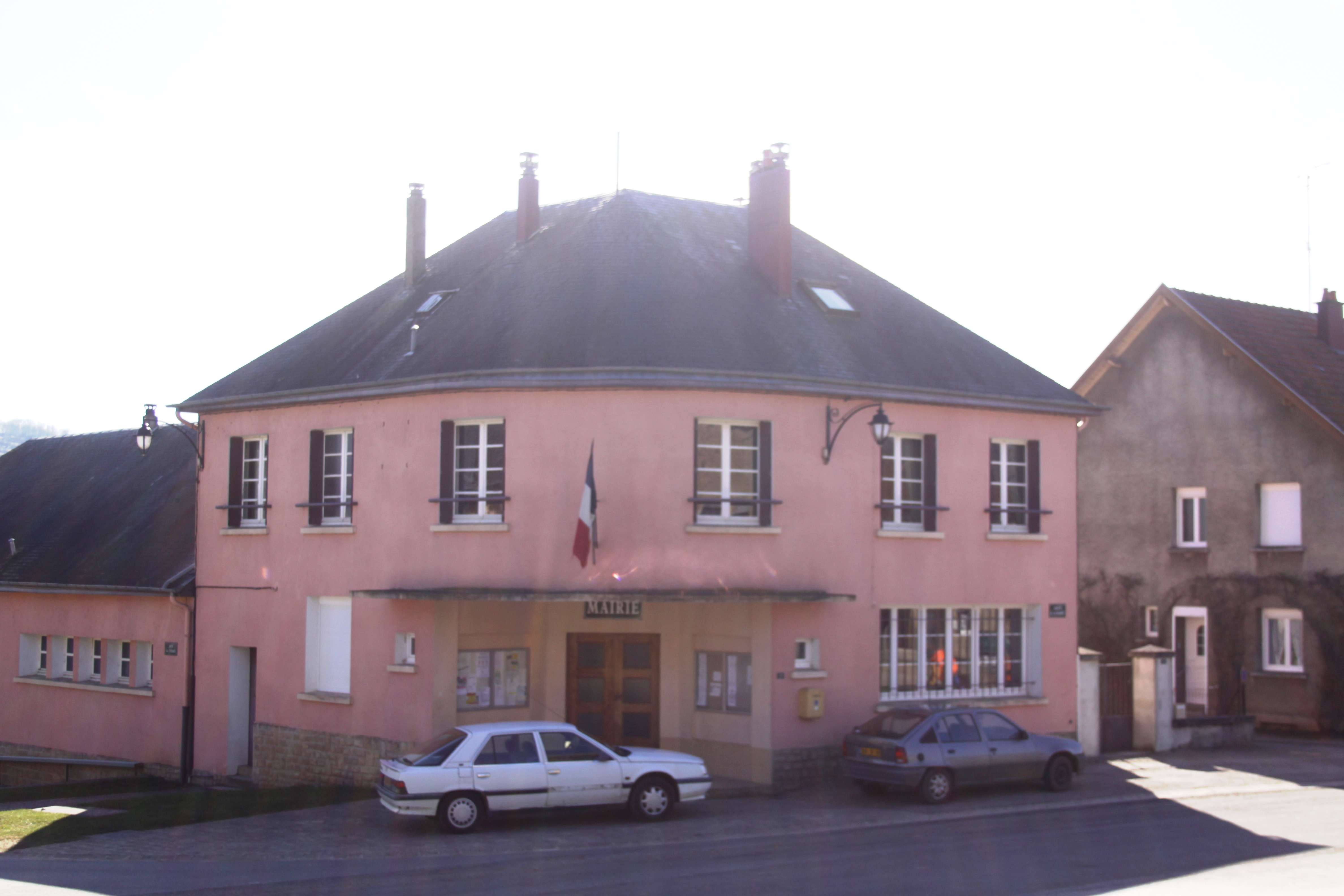 Village Ardennais